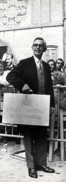 Minister van Financiën mr. R.J. Nelissen met het miljoenenkofferte op het Binnenhof, waar hij de miljoenennota aan de Tweede Kamer gaat aanbieden, Den Haag Nederland 21 september 1971.